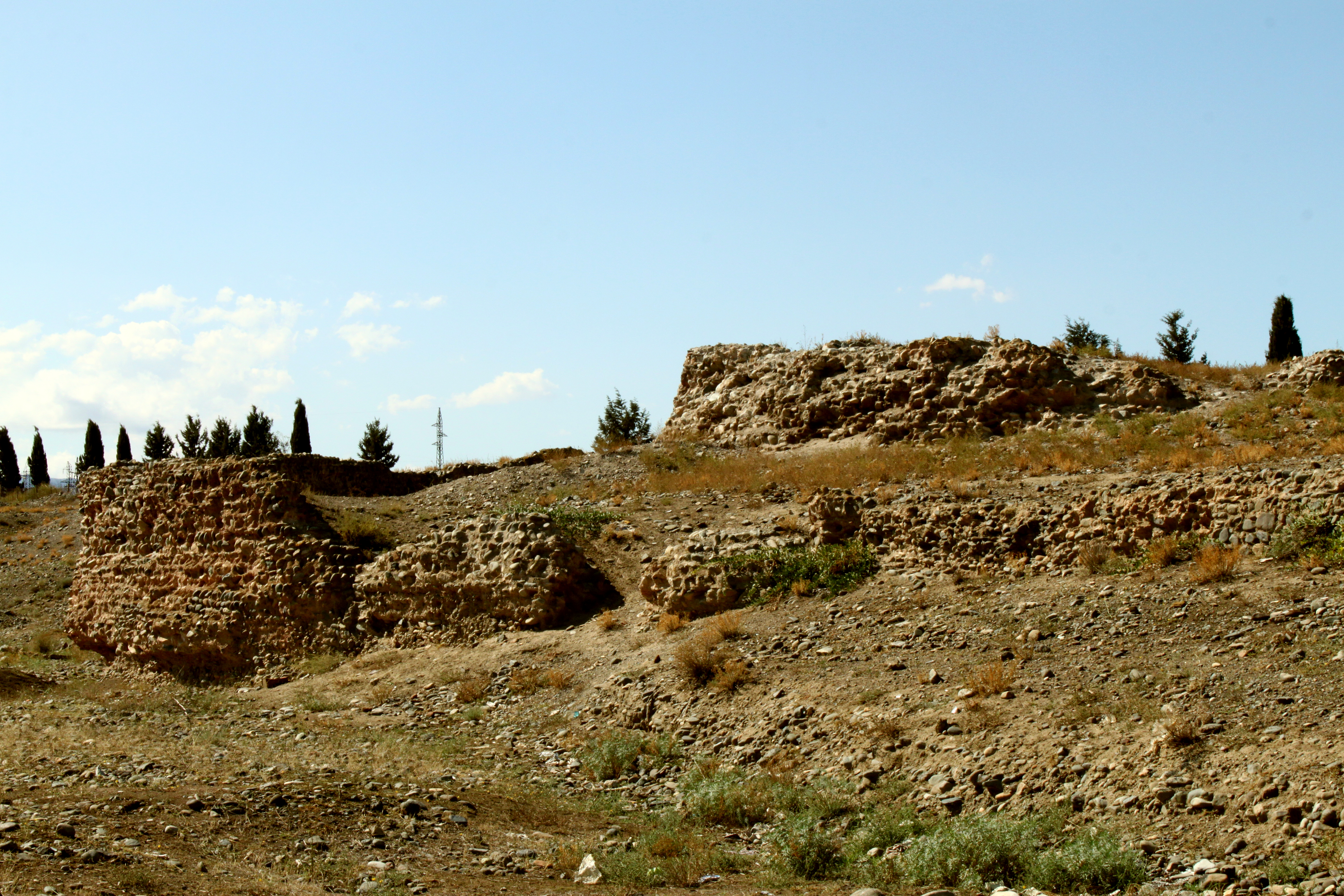 Qala divarı qalıqları